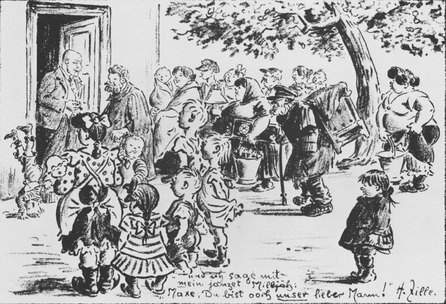 Zille und sein ‚Milljöh‘ gratulieren Max Liebermann.